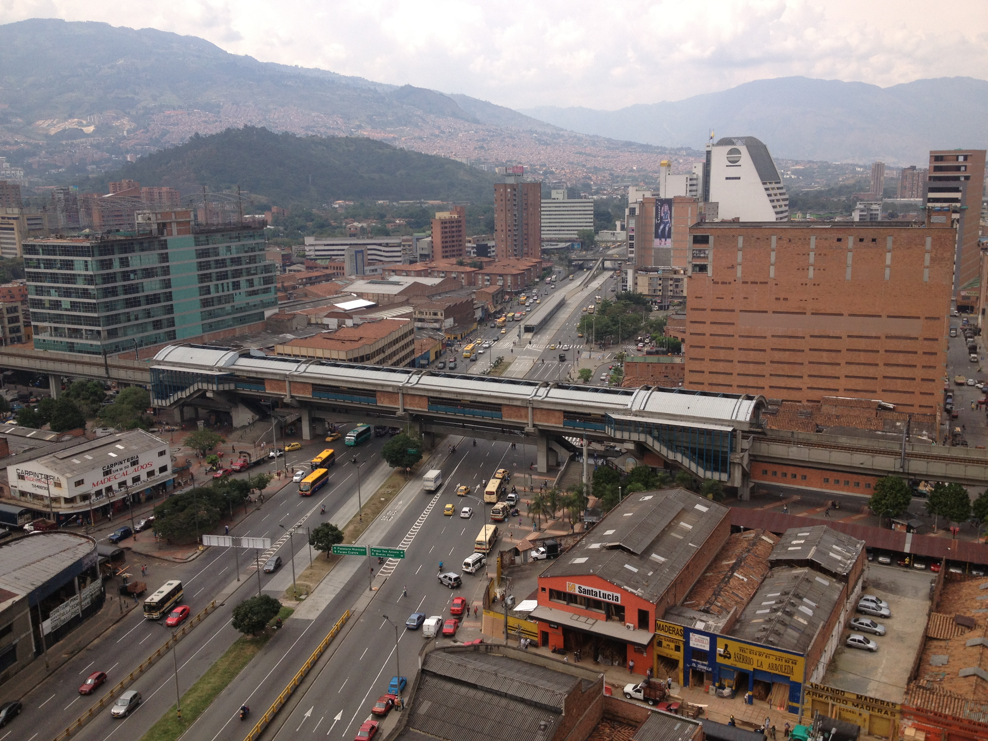 Estación Cisneros (Metro de Medellín)